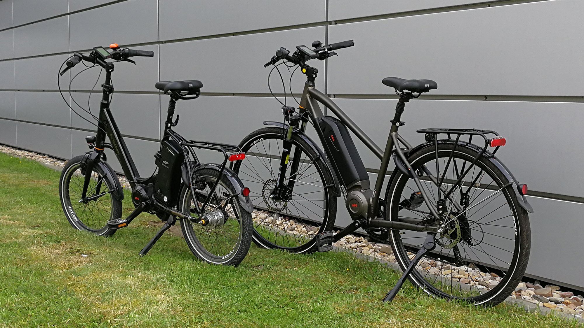 Vorne ein Kompakt E-Bike mit 20" Rädern und hinten ein Trekking Rad mit 28" Rädern